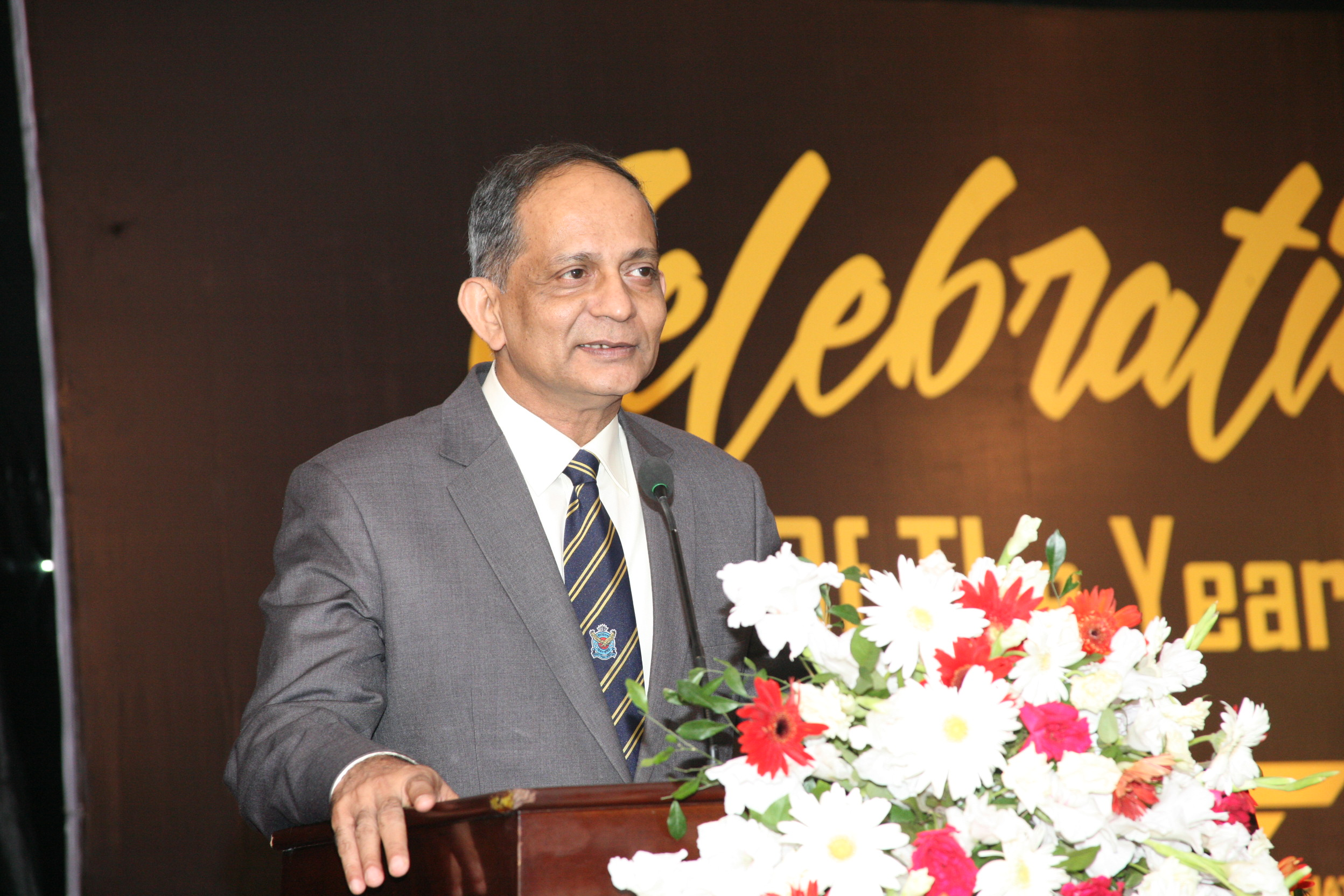 বিমান বাহিনীর সাবেক প্রধান এয়ার মার্শাল (অব.) মোহাম্মদ ইনামুল বারী। বর্তমানে তিনি বিমান বাংলাদেশ এয়ারলাইন্সের চেয়ারম্যানের দায়িত্ব পালন করছেন।